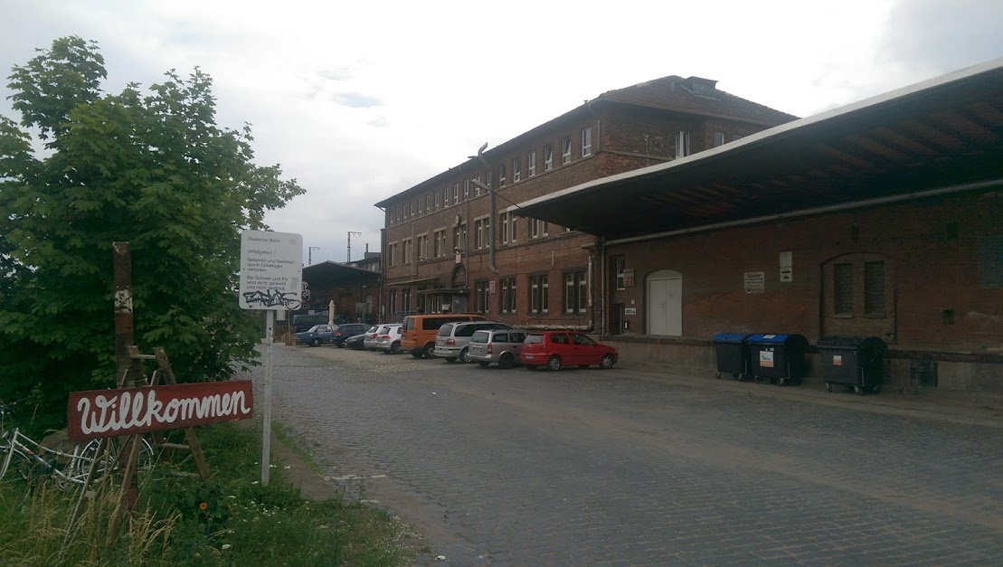 Güterschuppen Erfurt